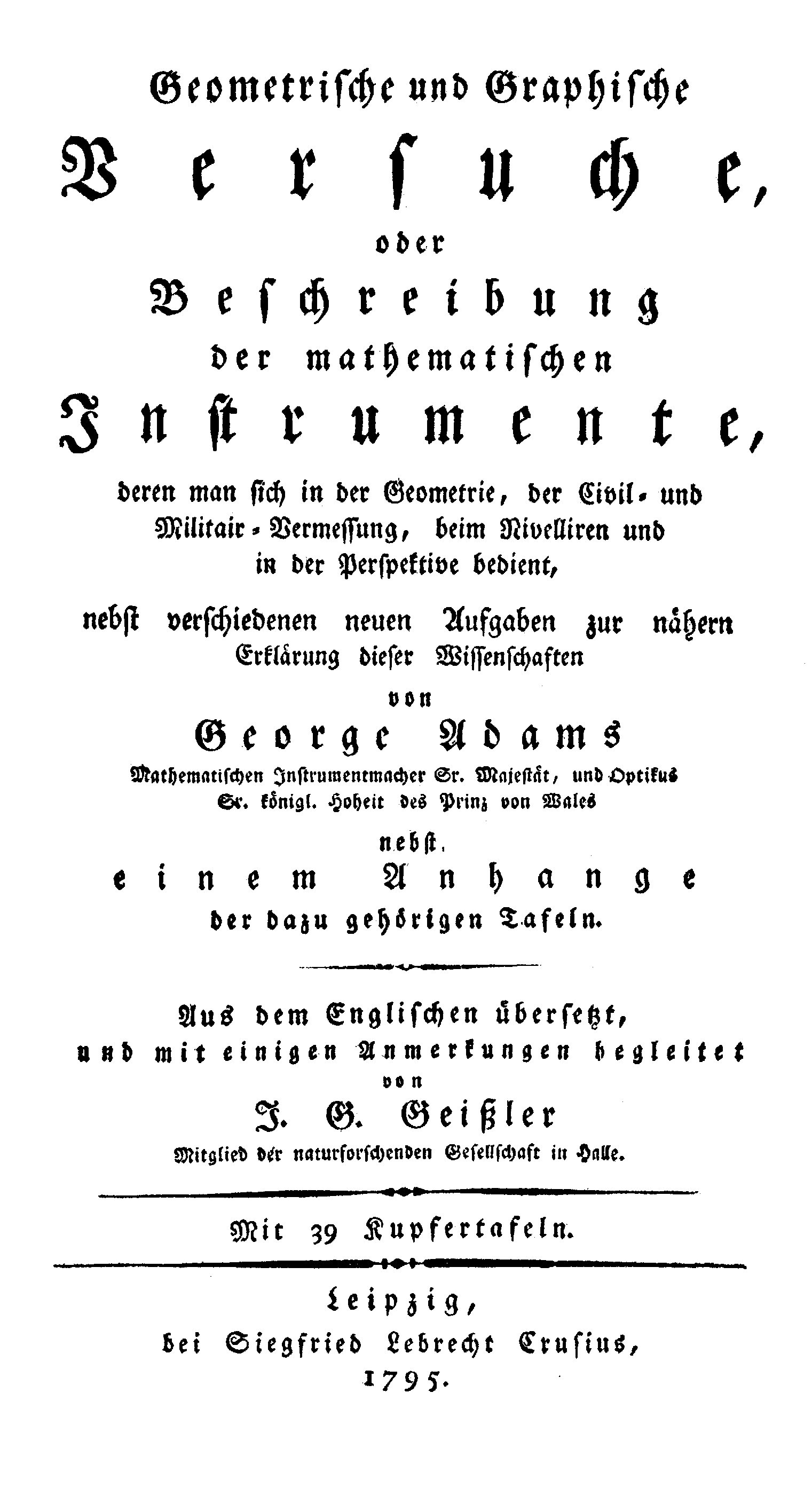 Titelseite des Buchs von George Adams von 1795